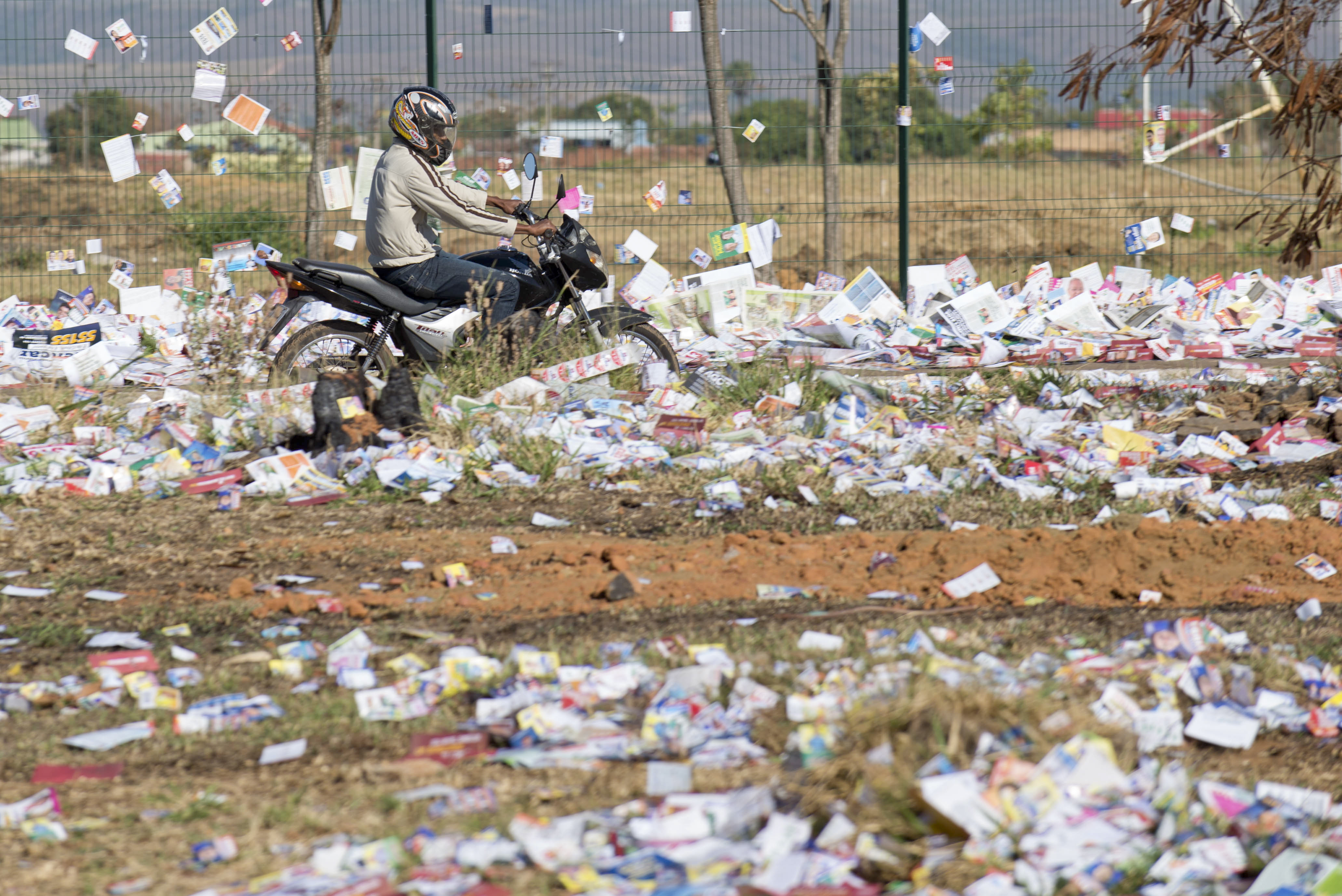 Eleições 2014 - Dia de votação em Gama, Distrito Federal. Foto: Pedro França/Agência Senado